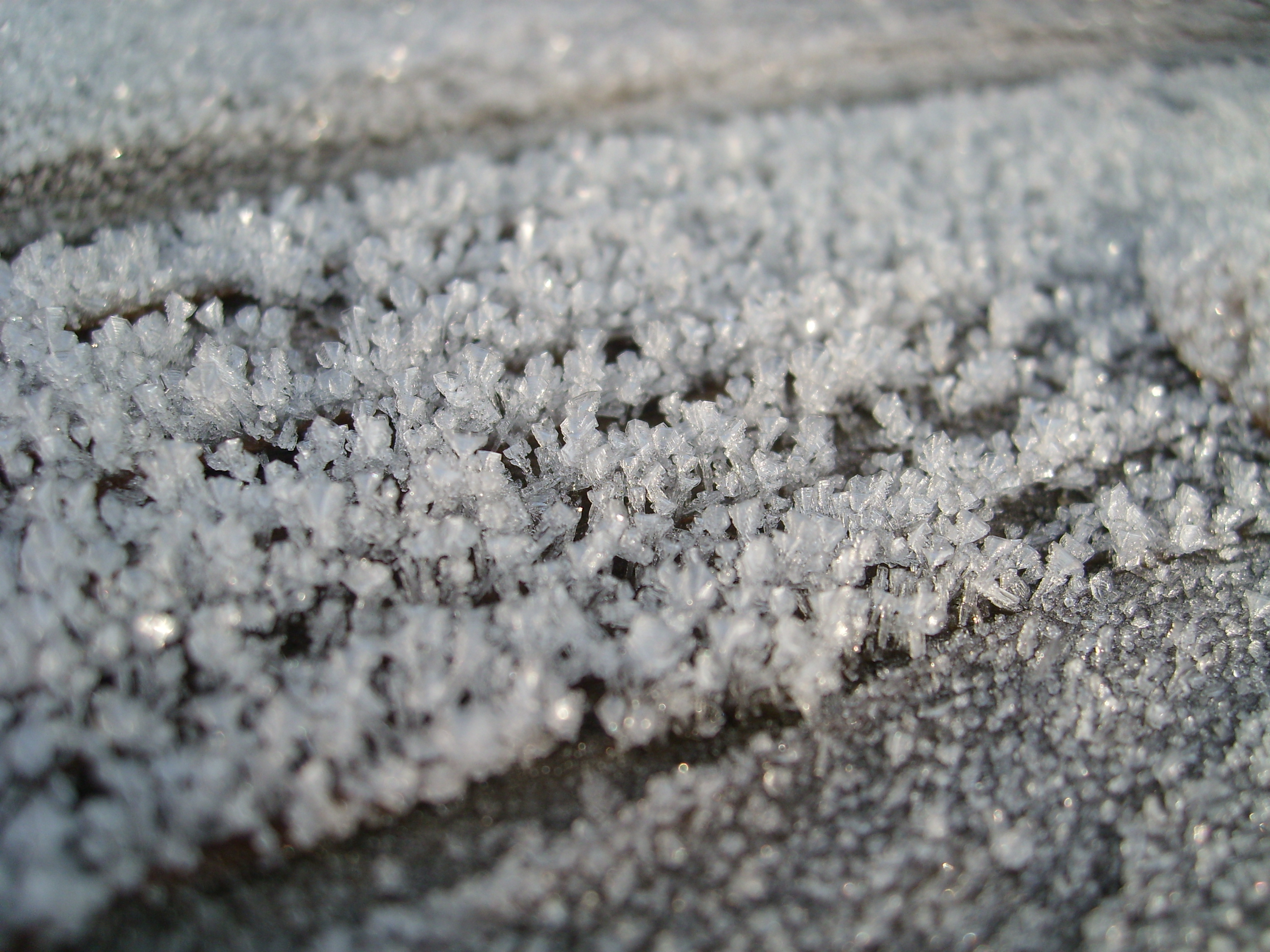 Frost (close-up)